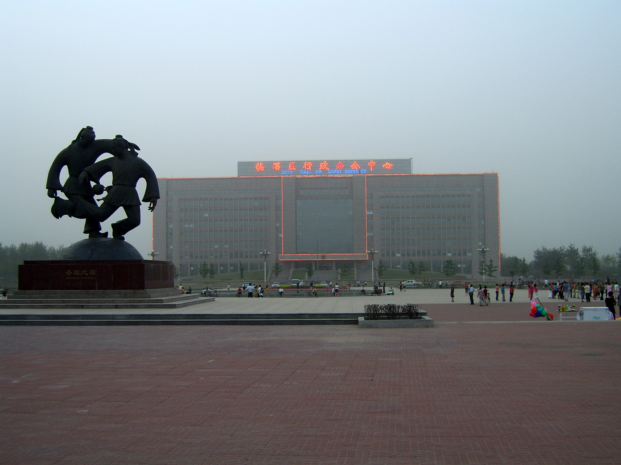 临淄区行政办公中心